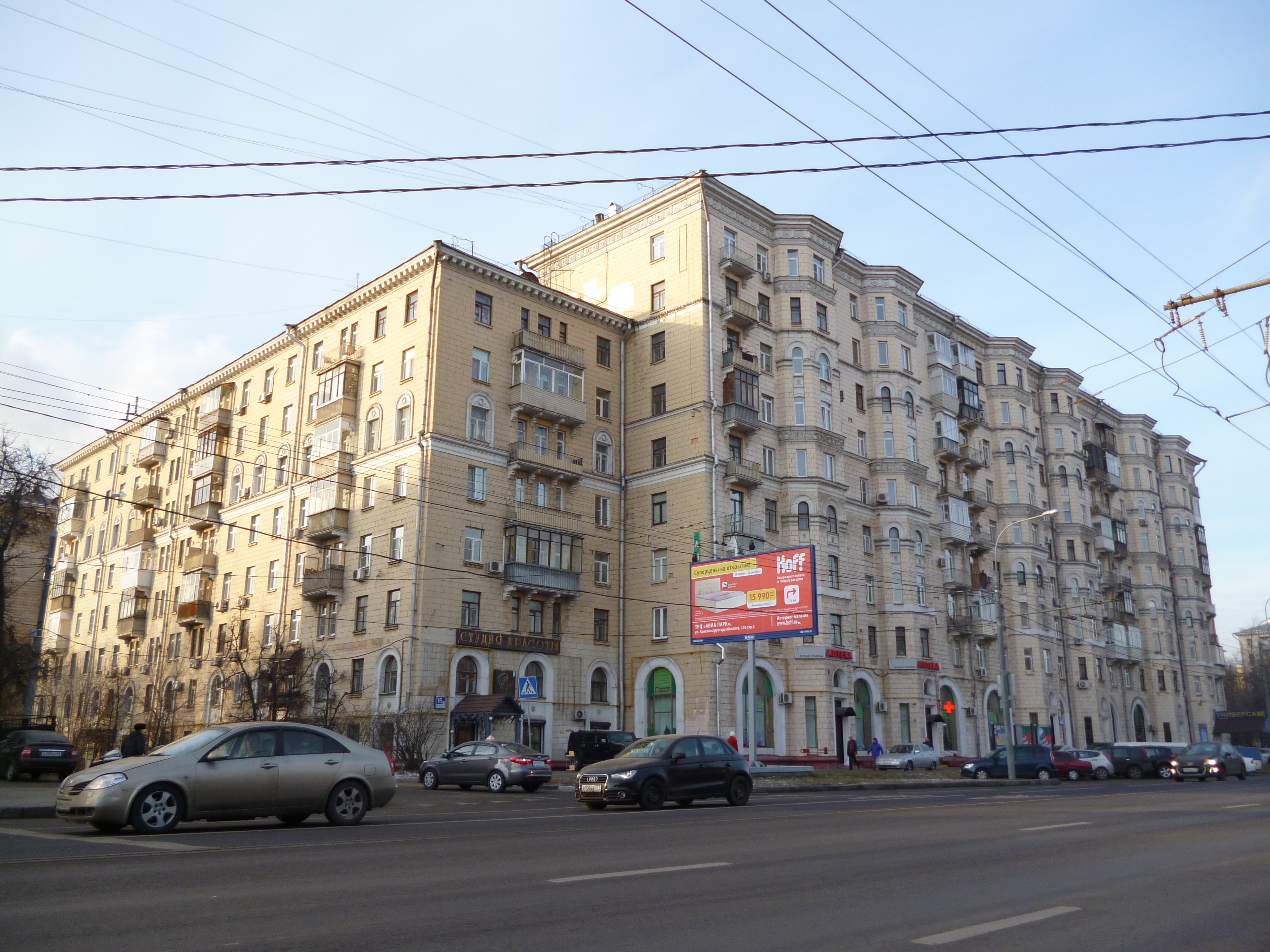 Улица Куусинена, дом 15